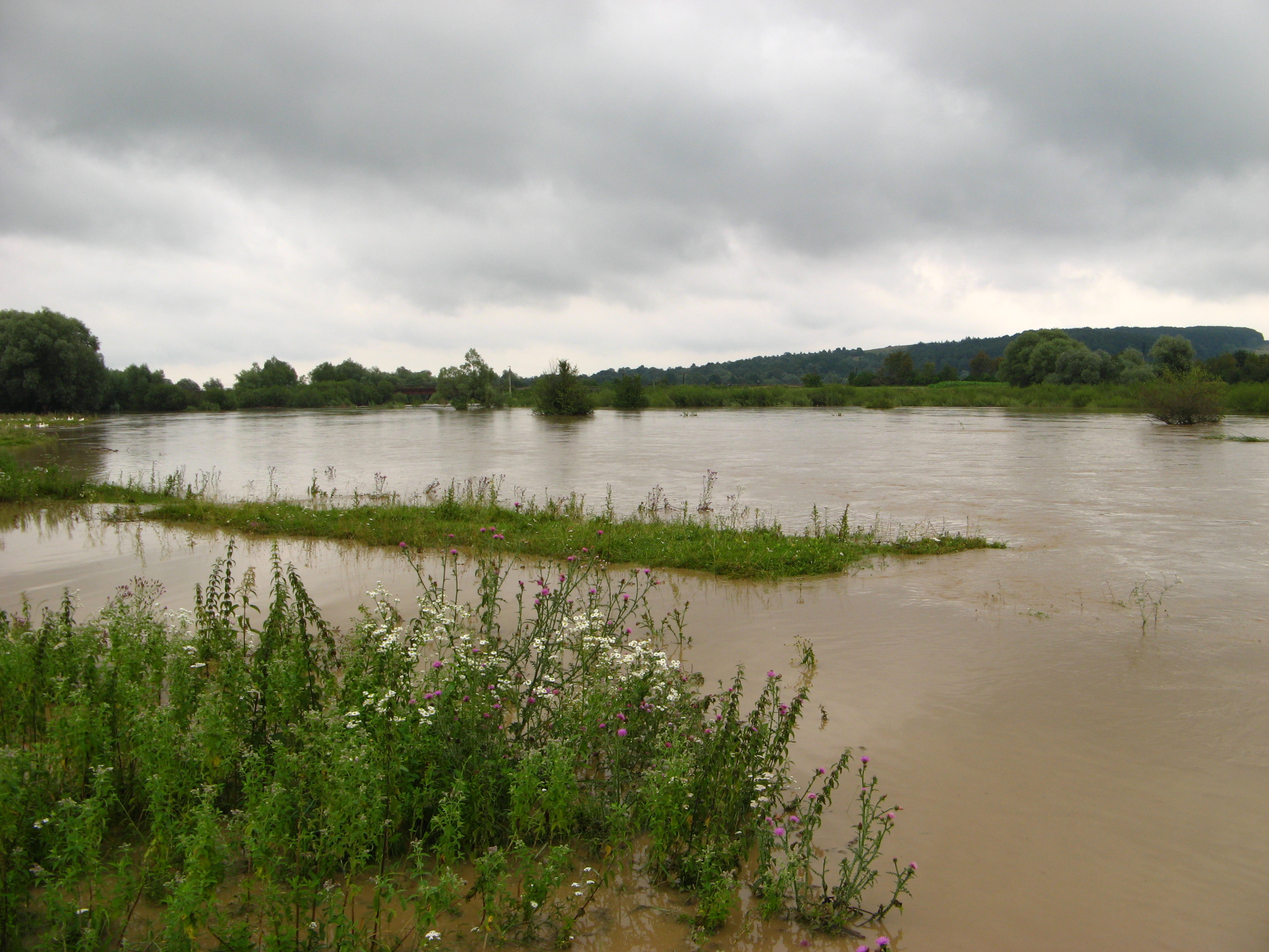 Вігор